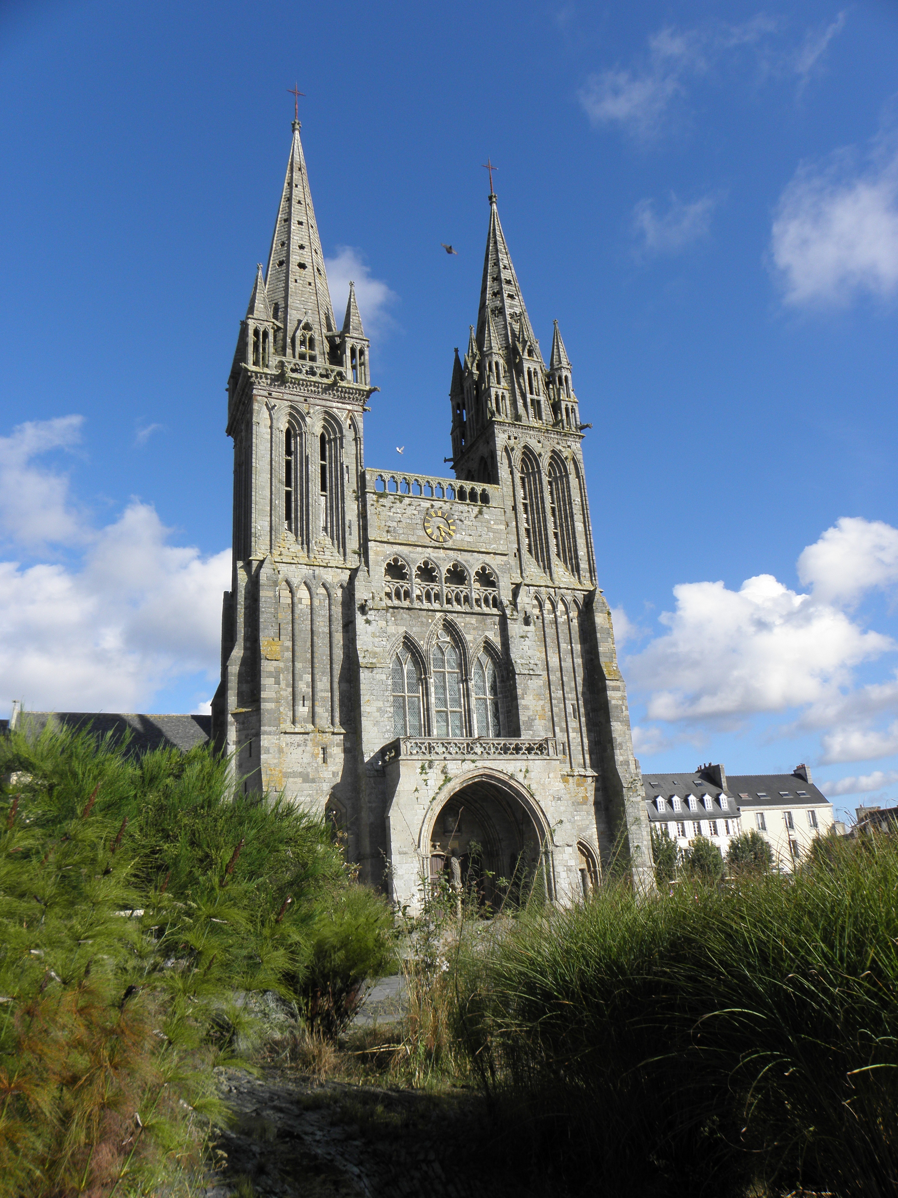 Façade occidentale de la cathédrale Saint-Paul-Aurélien de Saint-Pol-de-Léon (29). .